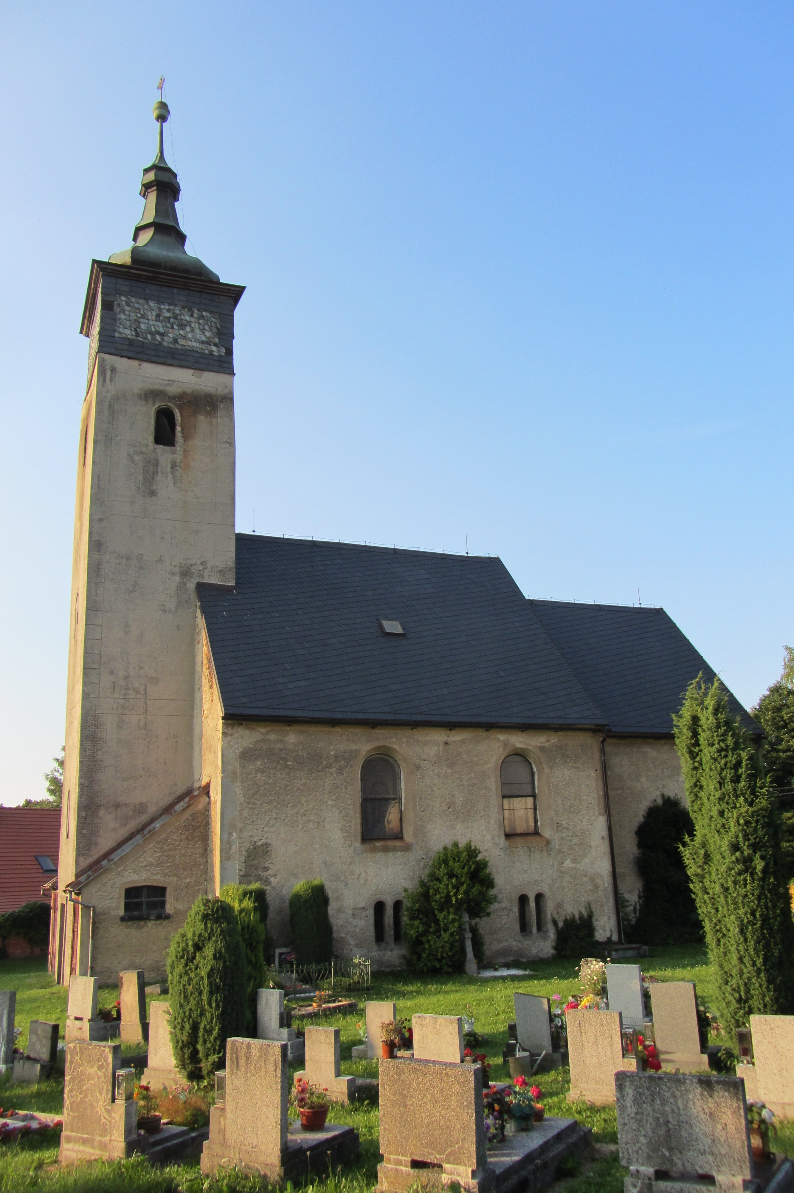 Kostel v Ludvíkově pod Smrkem (pohled od jihu).